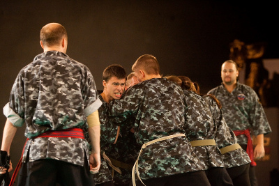 Stenka l'art martial corps à corps